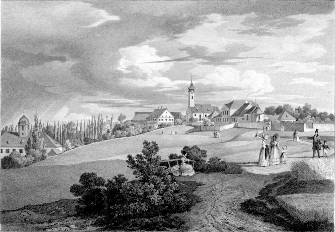 ehemaliges Rokokoschlösschen im Münchner Stadtteil Bogenhausen neben der Kirche St. Georg und dem Pfarrhaus, linkks am Bildrand im Tal das Bad Brunnthal